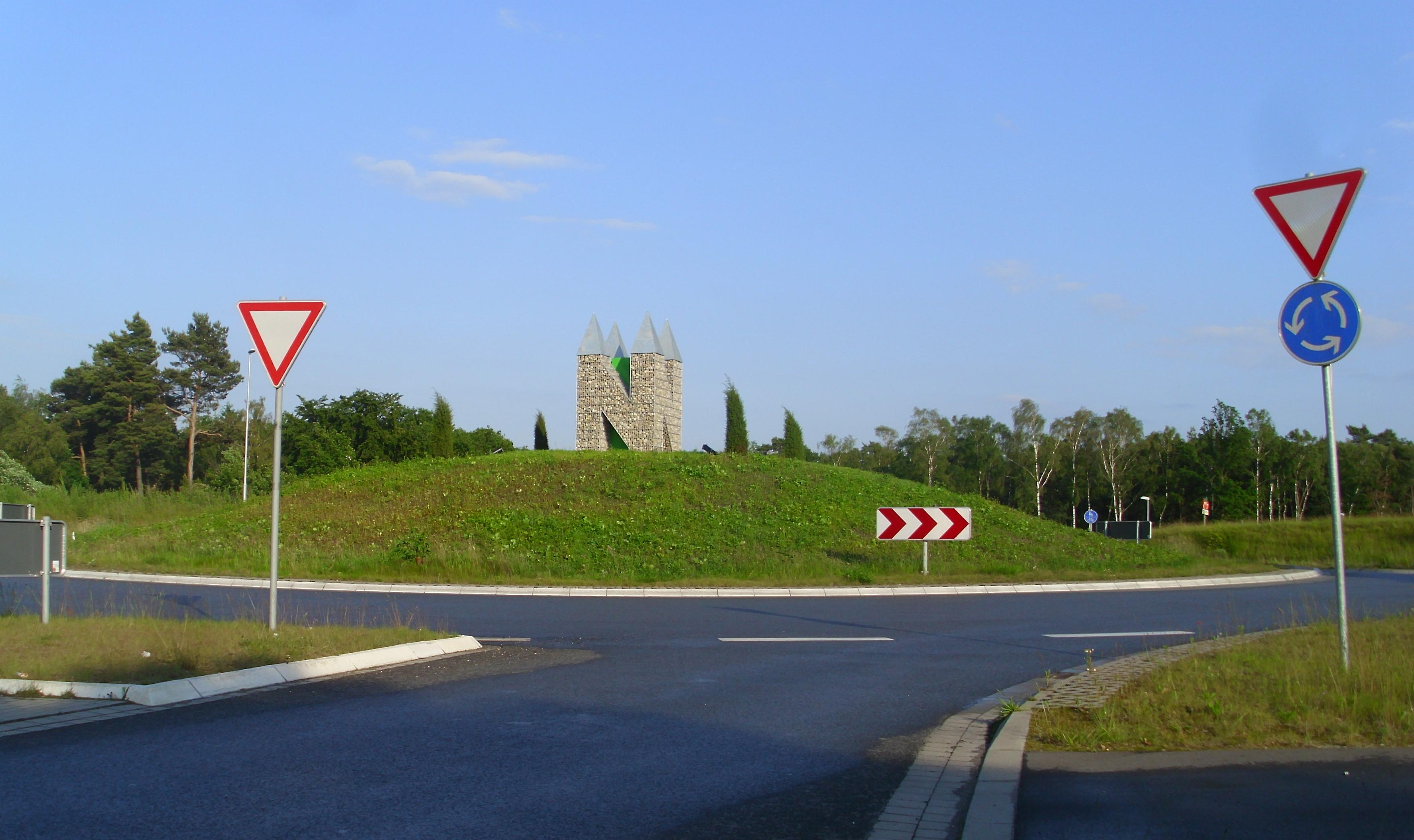 Vierseitiges N mit Spitzen auf dem Kreisverkehr in Neuenkirchen (Kreis Steinfurt) an der Kreuzung B70, B499 und Burgsteinfurter Damm. Der Kreisverkehr befindet sich auf dem Münsterländer Kiessandzug, deshalb sind die Steine in den Gabionen, aus eiszeitlichem Geschiebe.